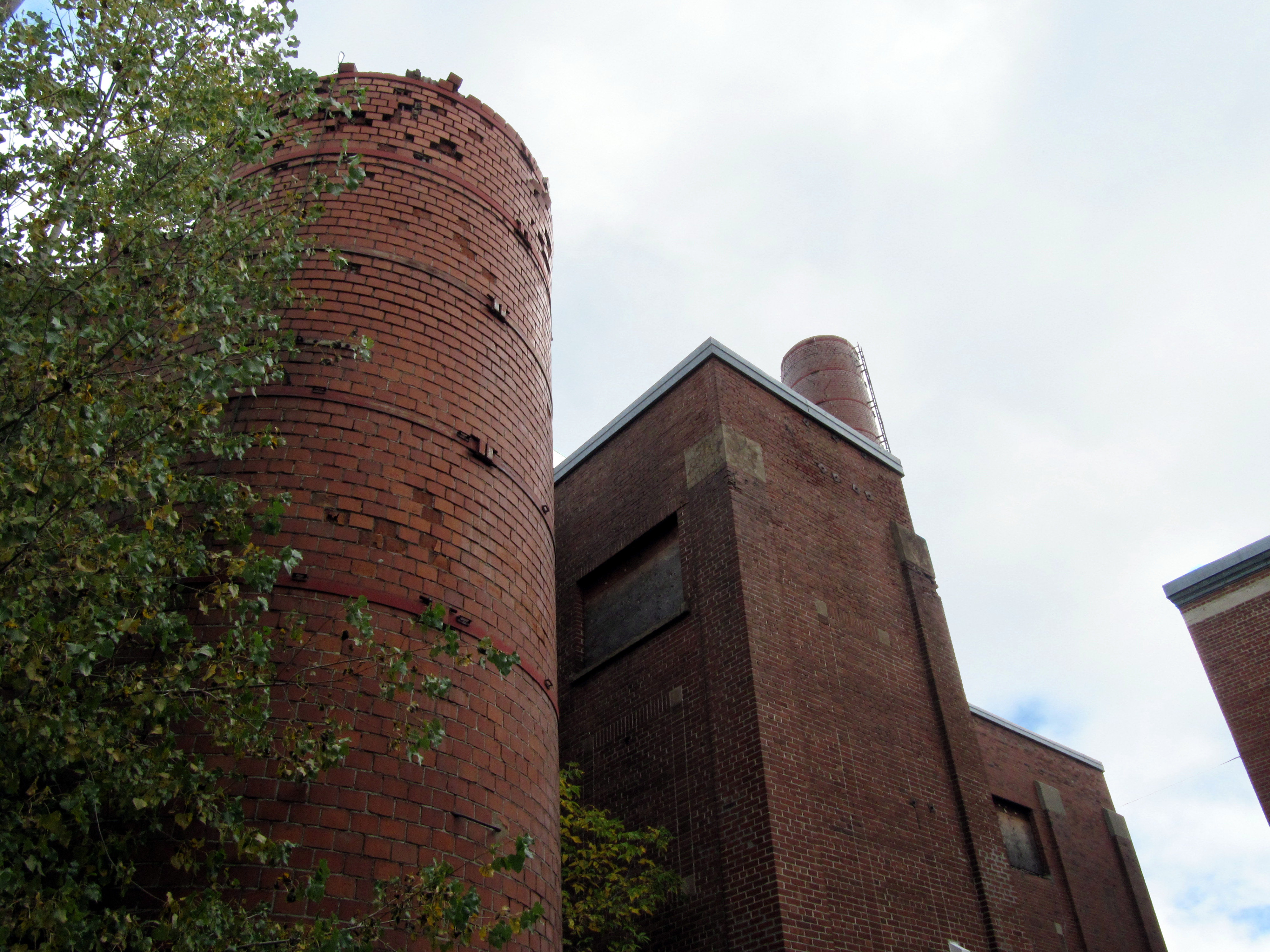 Usine de textile de Magog. Lieu historique national du Canada (id : 638). Située au 160 rue Principale Est à Magog, Québec. Les deux cheminées.